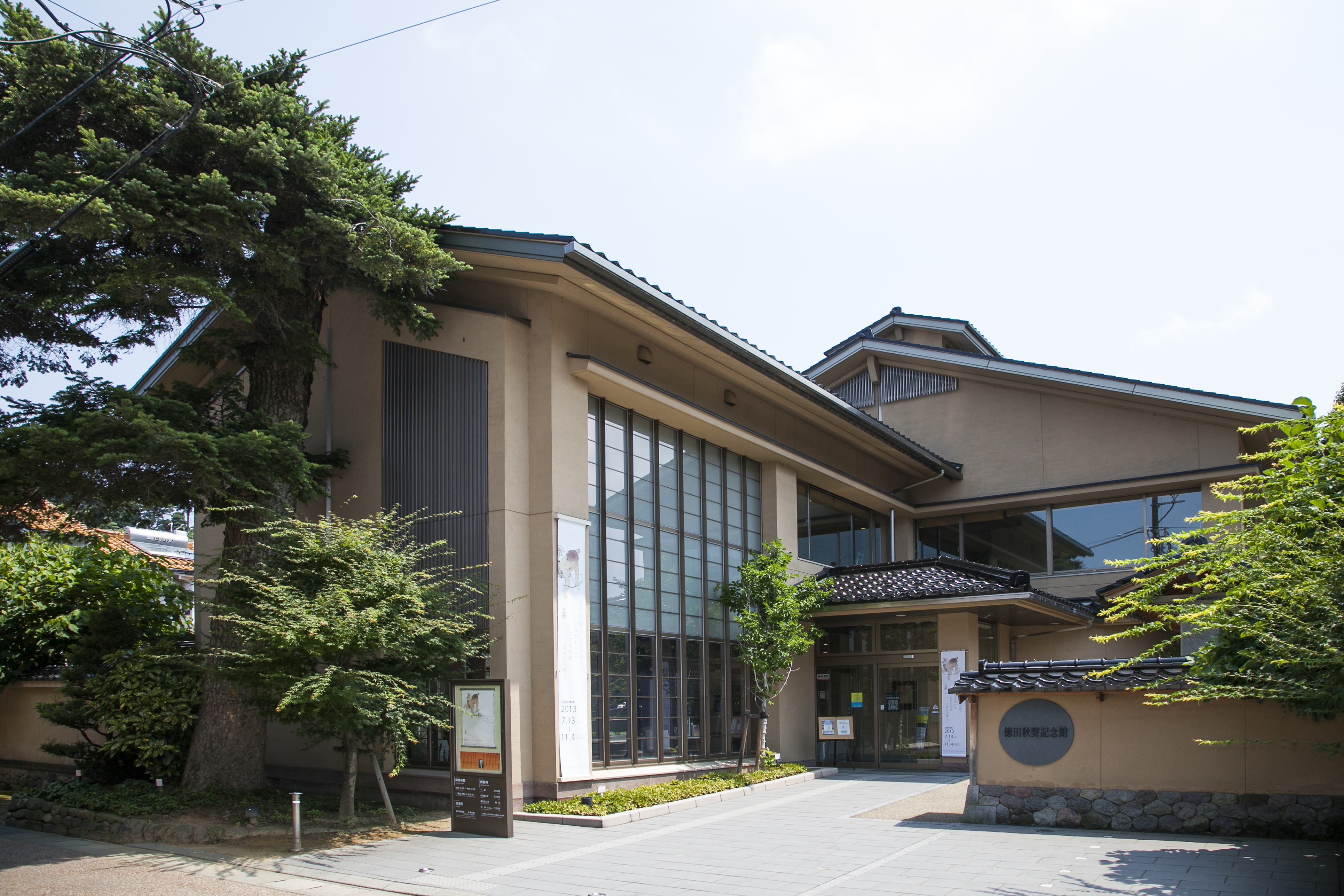 徳田秋声記念館